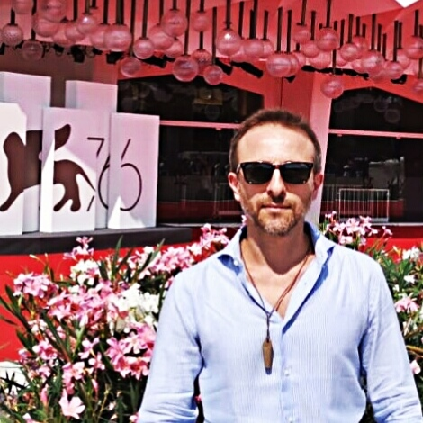 Fabio Morici alla 76ª Mostra del Cinema di Venezia, per la presentazione di The Red Hour.